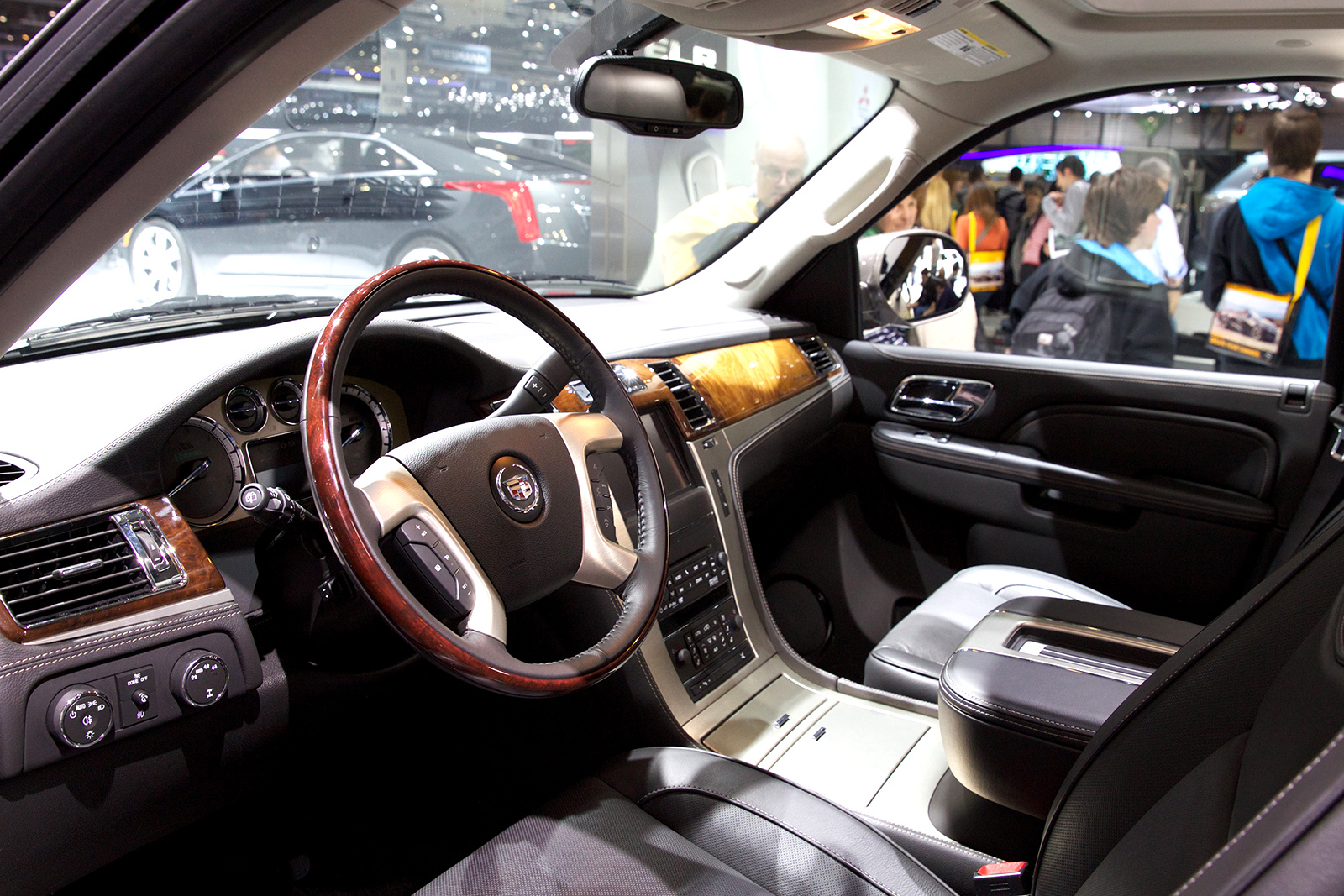 Cockpit eines Cadillac Escalade